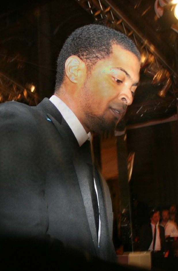 Noel Clarke